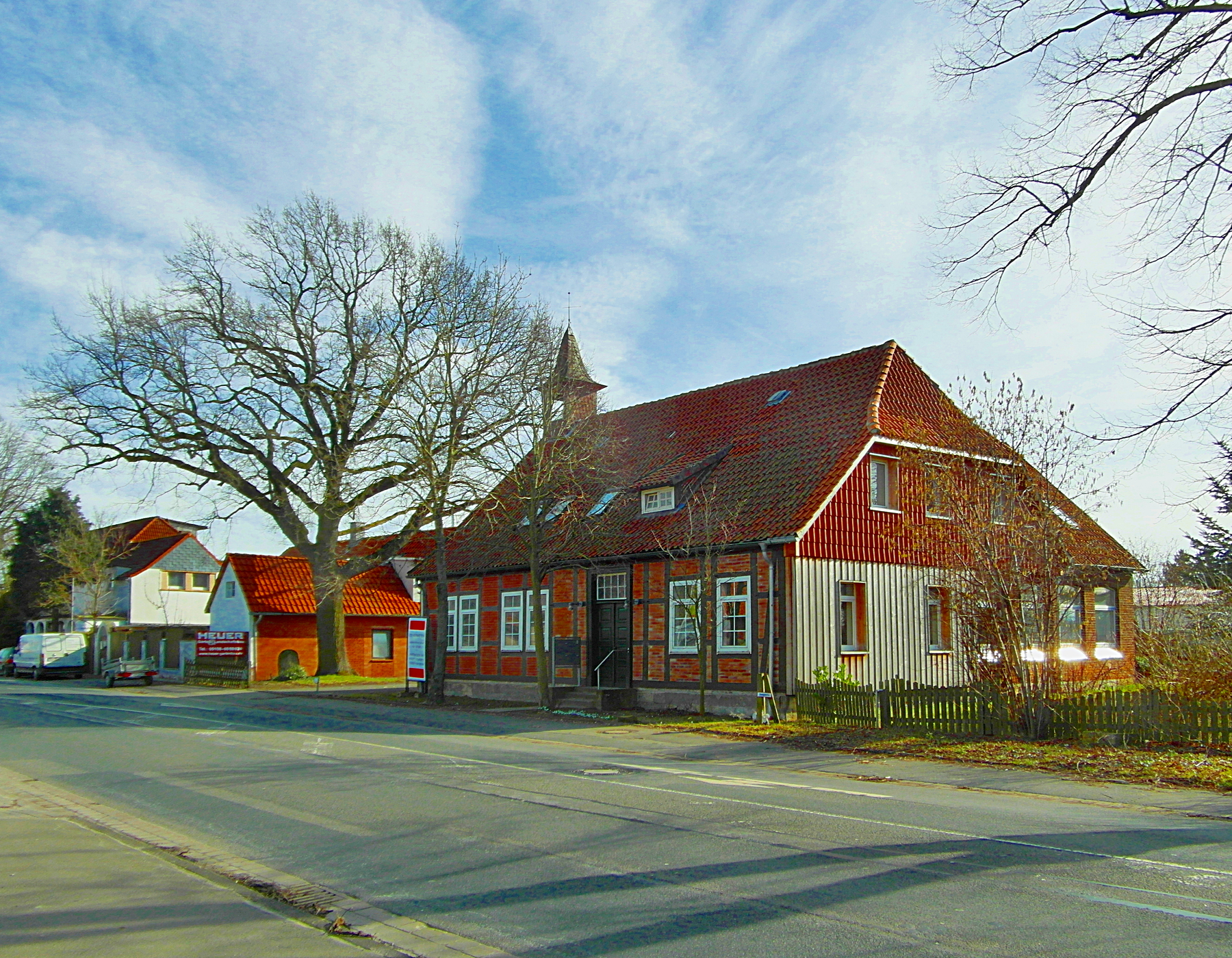 Die ehemalige Kapelle im Gehrdener Stadtteil Ditterke wurde zur Dorfschule umgebaut. Die Eiche auf dem Schulhof dahinter ist als Naturdenkmal geschützt